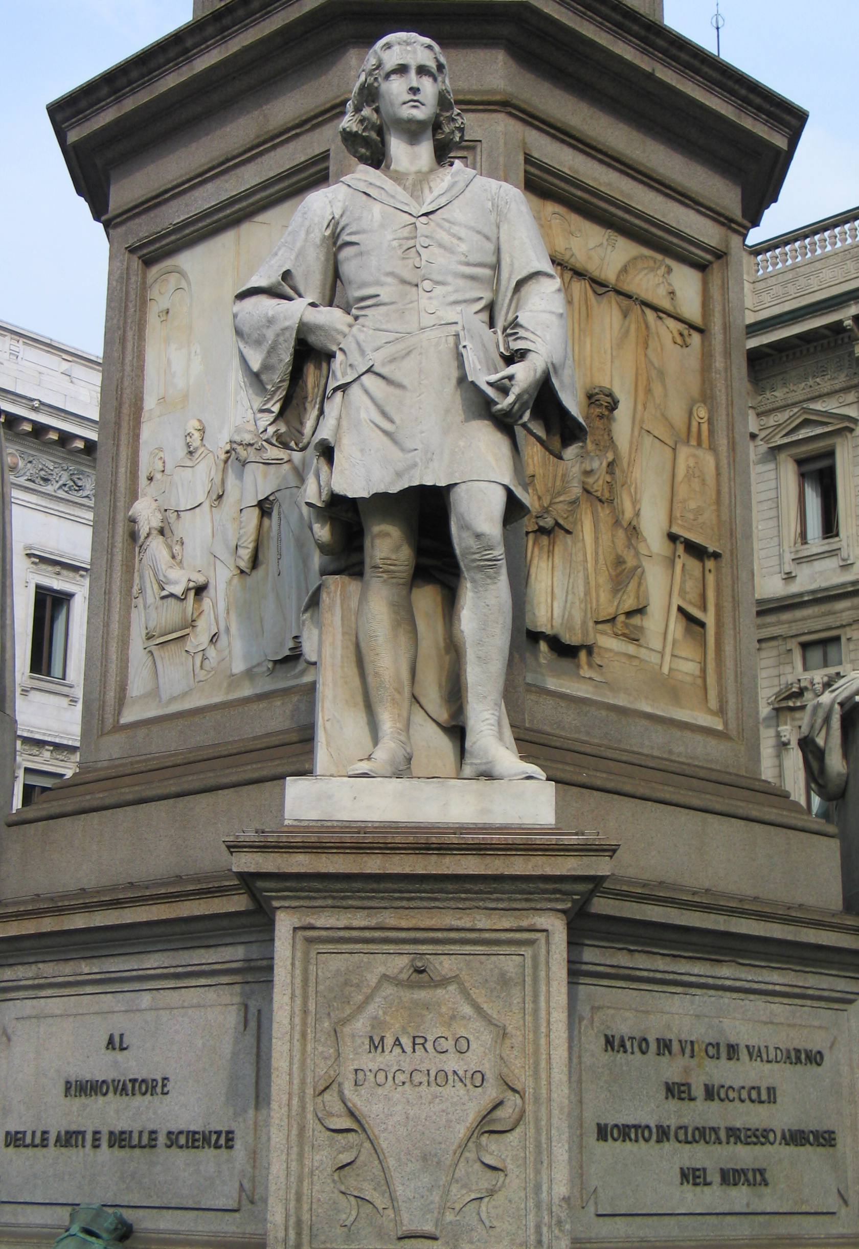 Figure of Italian painter Marco d'Oggiono at the pedestal of Leonardo da Vinci monument. Milan, Piazza della Scala. Sculptor Pietro Magni. Pictured by Andrei Romanenko. June 2006.